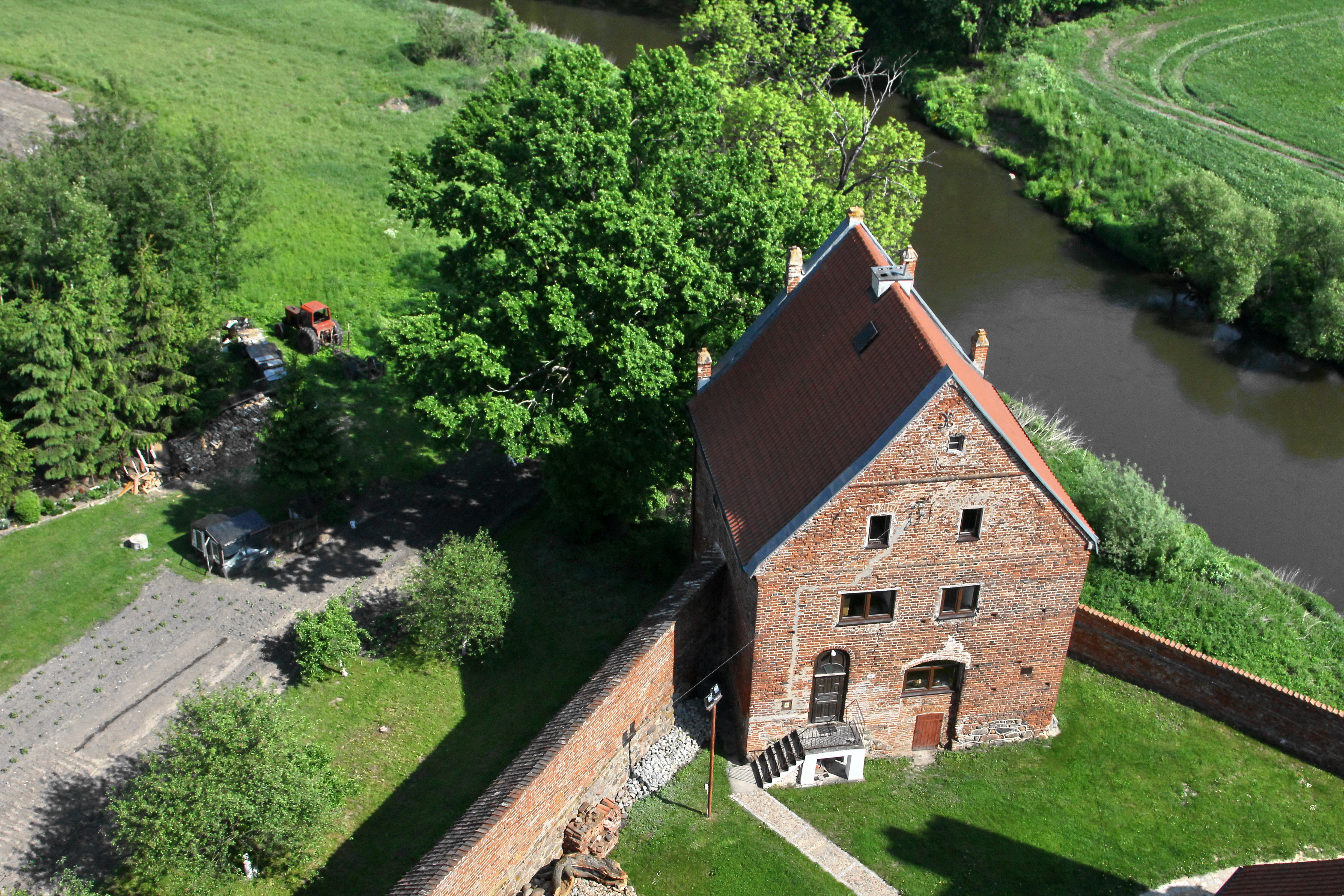 Baszta organistówka – najstarsza budowla w Sępopolu oraz Łyna. Widok z wieży kościoła św. Michała Archanioła.